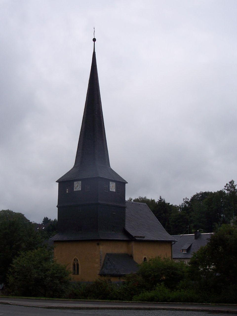 Wehrkirche St. Johannes Baptista, Steinbach am Wald